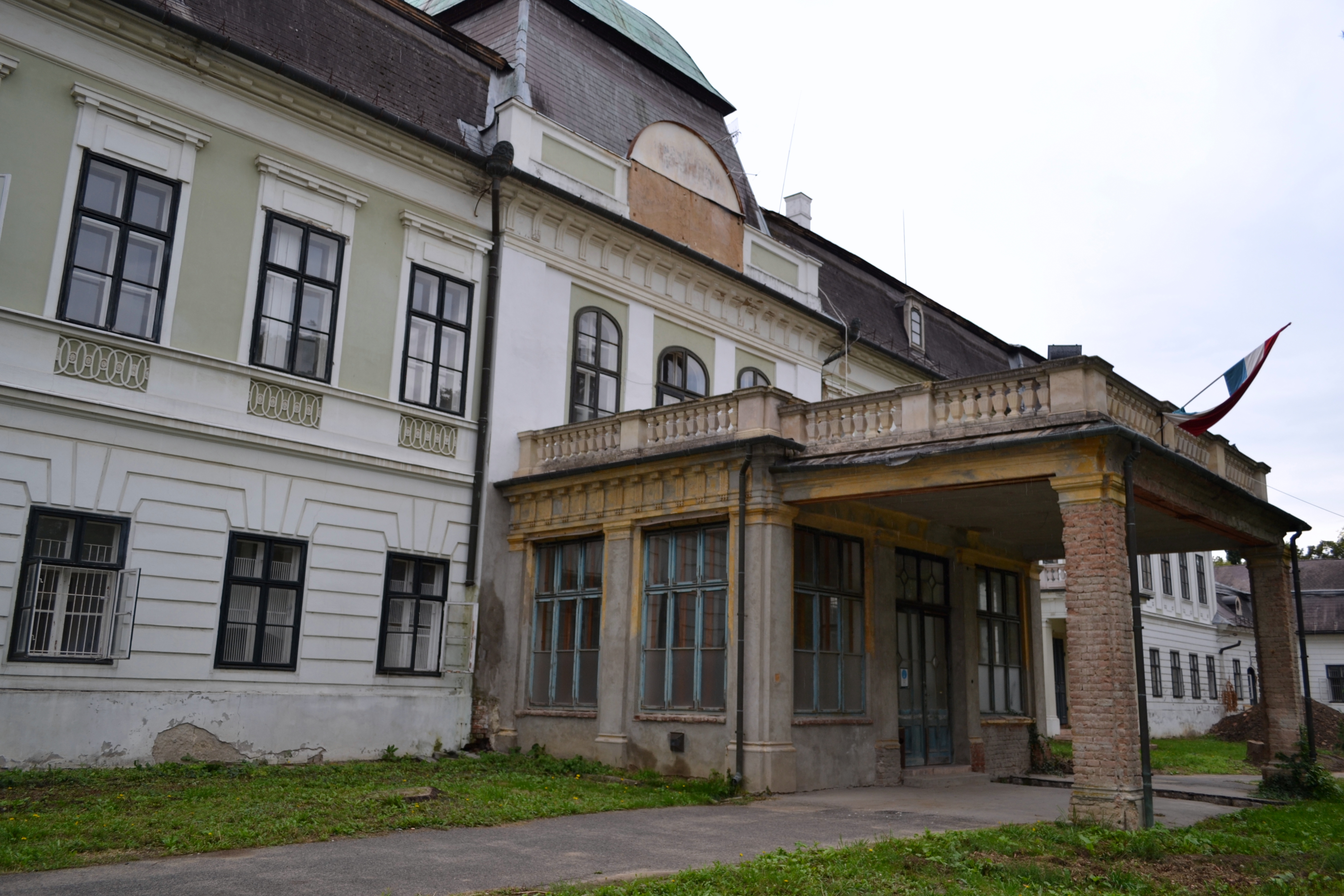 Harruckern–Wenckheim–Almássy-kastély együttese és parkja. Gyula. This is a photo of a monument in Hungary. Identifier: 2477